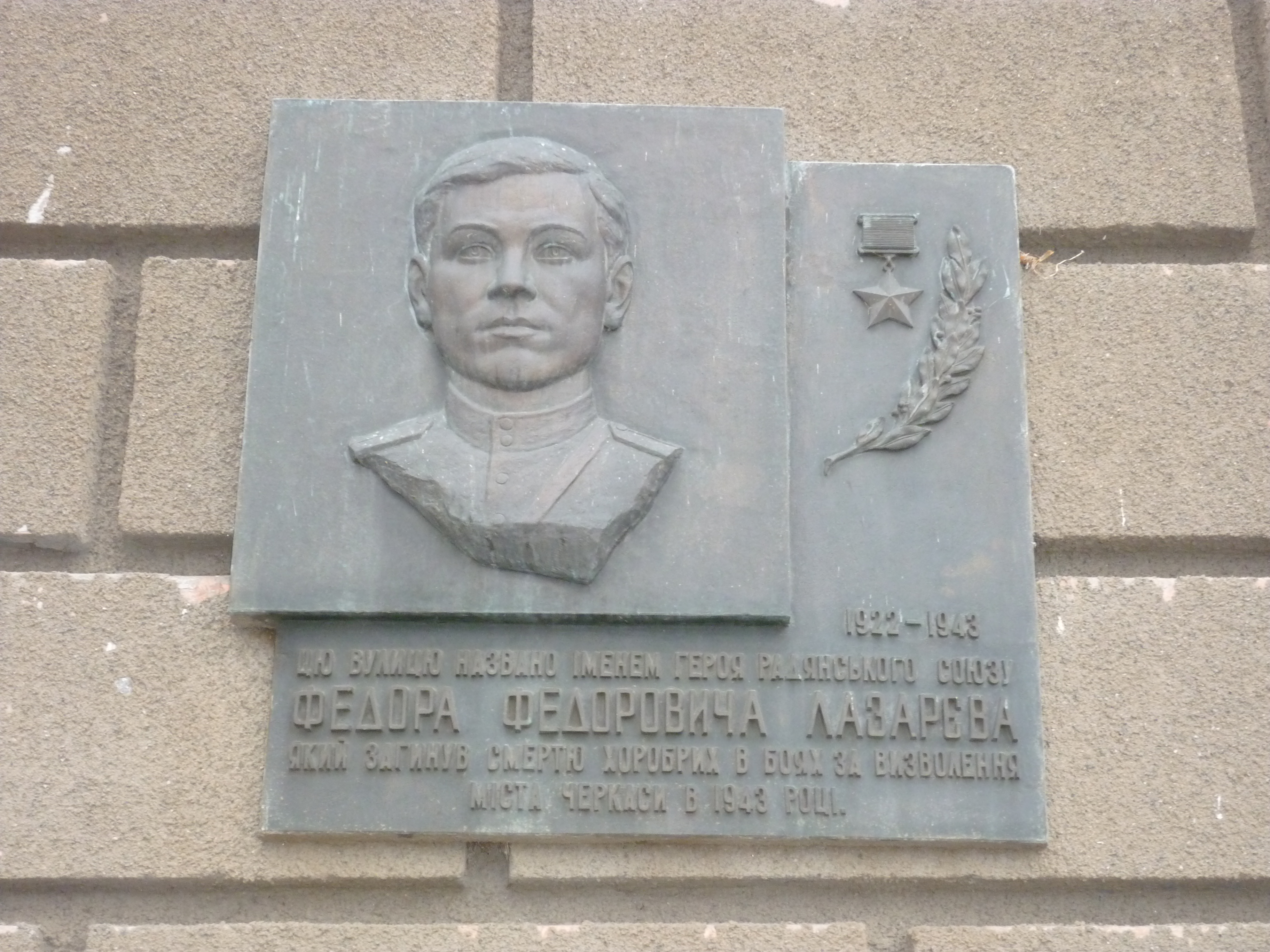 Пам'ятна табличка Герою Радянського Союуз Ф.Ф.Лазареву на фасаді готелю Черкаси про назву на його честь вулиці в місті Черкаси